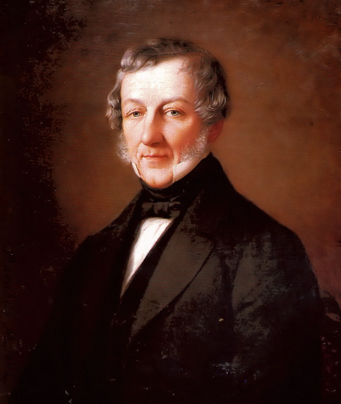 a budapesti Lánchíd tervezője